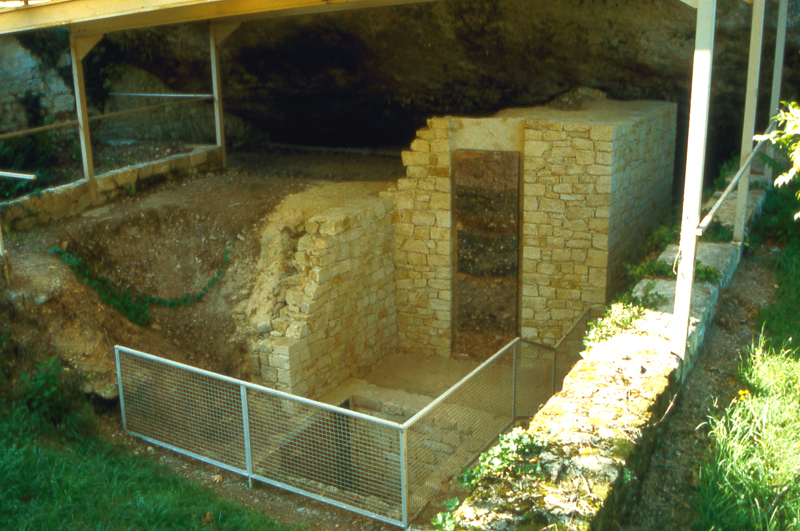 abri inférieur du site préhistorique Moustier, Dordogne, France - photo personnelle V. Mourre